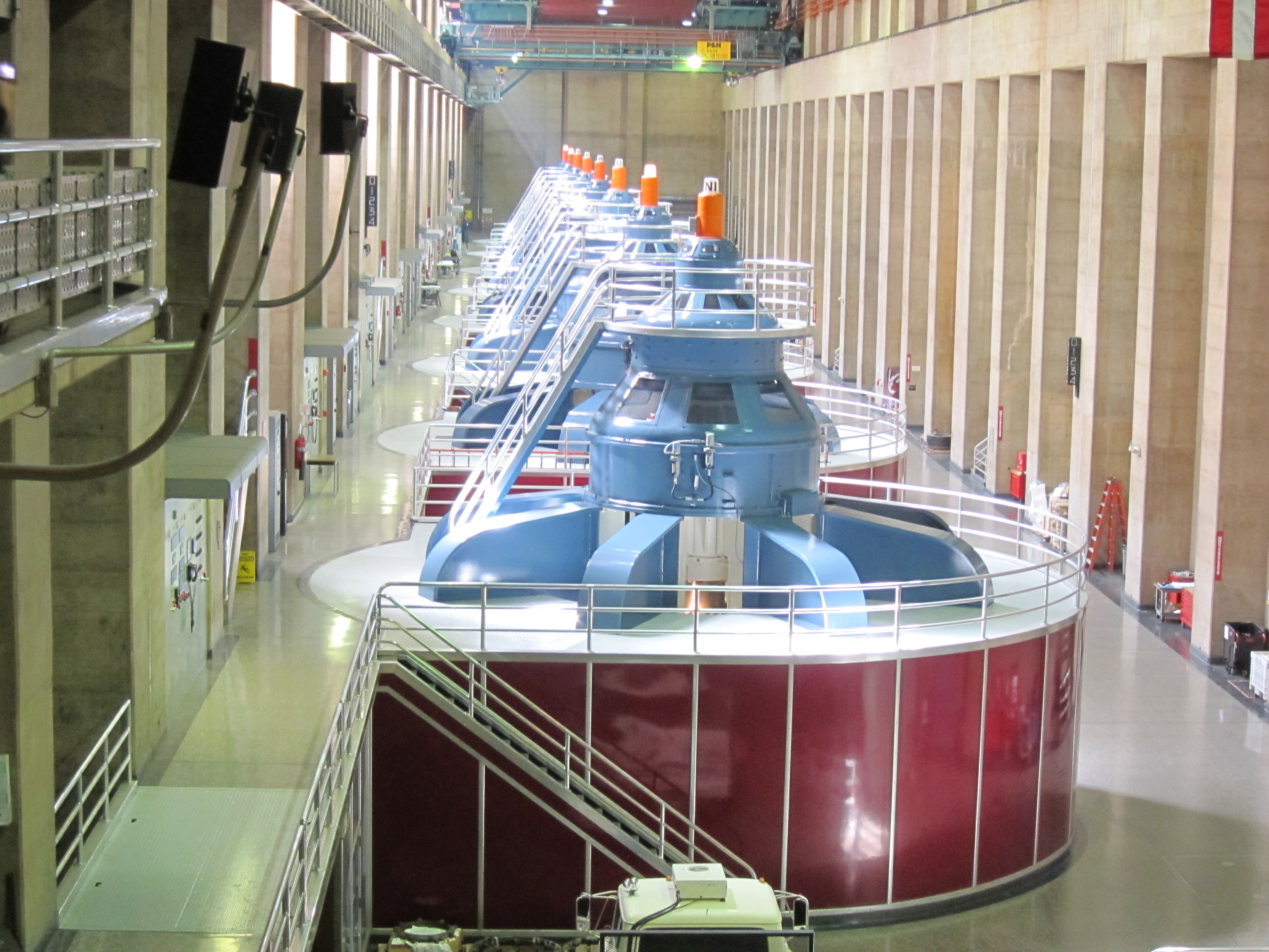 Generateurs electriques cote Nevada